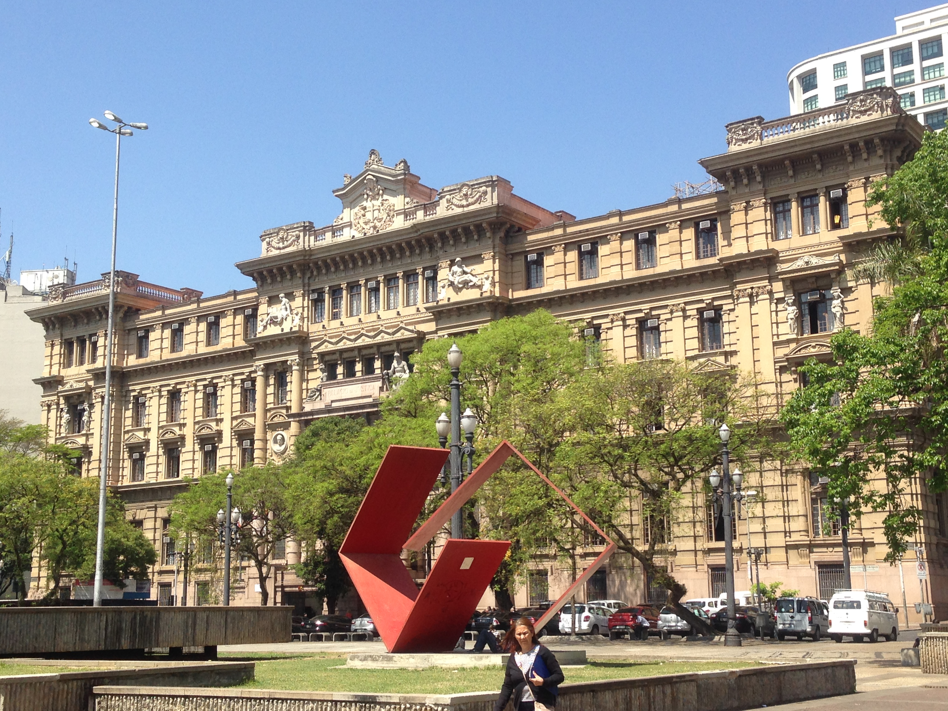 Vista para a escultura próxima à entrada do Palácio da Justiça, em São Paulo (SP), Brasil